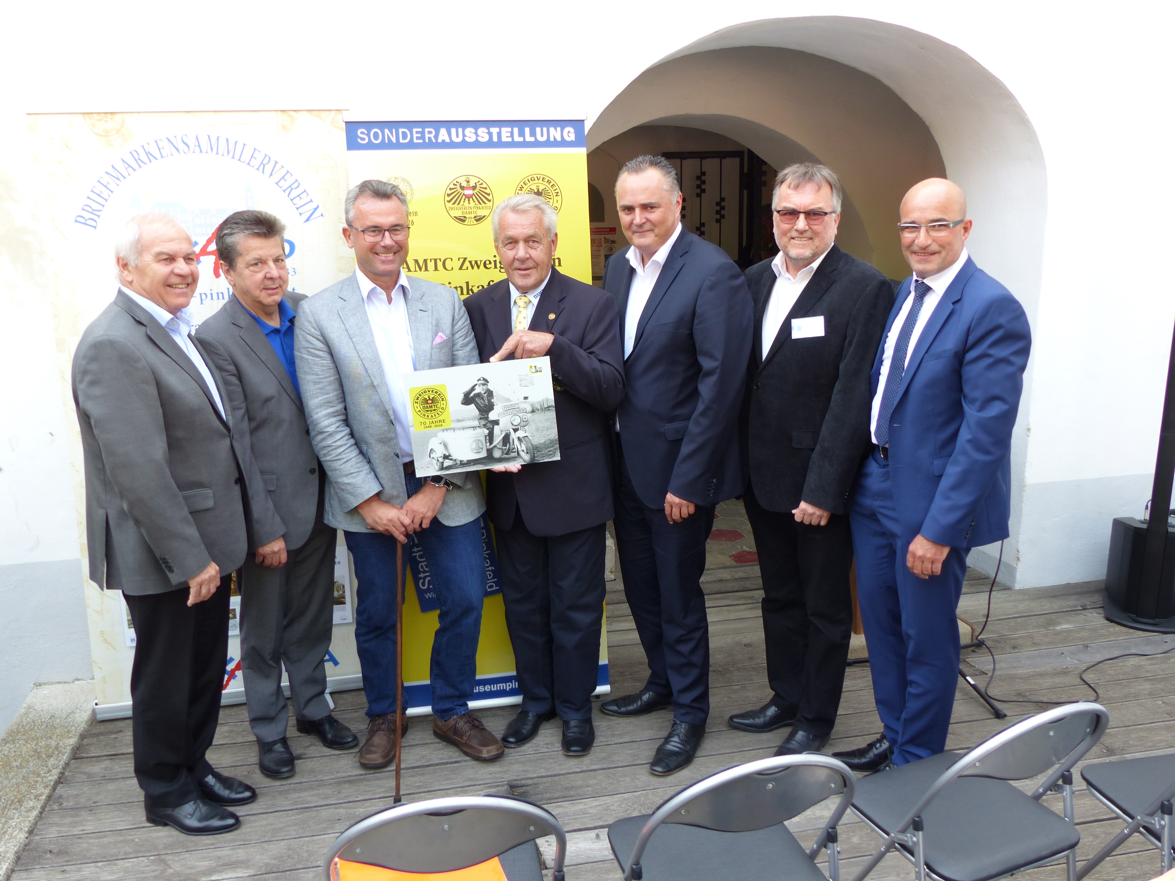 Eröffnung der Sonderausstellung "70 Jahre ÖAMTC Zweigstelle Pinkafeld" am 5. Mai 2018. Personen (von links nach rechts): Friedrich Luisser (2. Vizebürgermeister, ÖVP), Herrmann Wolfahrt (Obmann Briefmarkensammlerverein Pinkafeld), Minister Norbert Hofer (FPÖ), Eduard Latschenberger (Obmann ÖAMTC Zweigverein Pinkafeld), Landesrat Hans Peter Doskozil (SPÖ), Rudolf Köberl (Obmann Museumsverein Pinkafeld), Franz Rechberger (1. Vizebürgermeister, SPÖ)